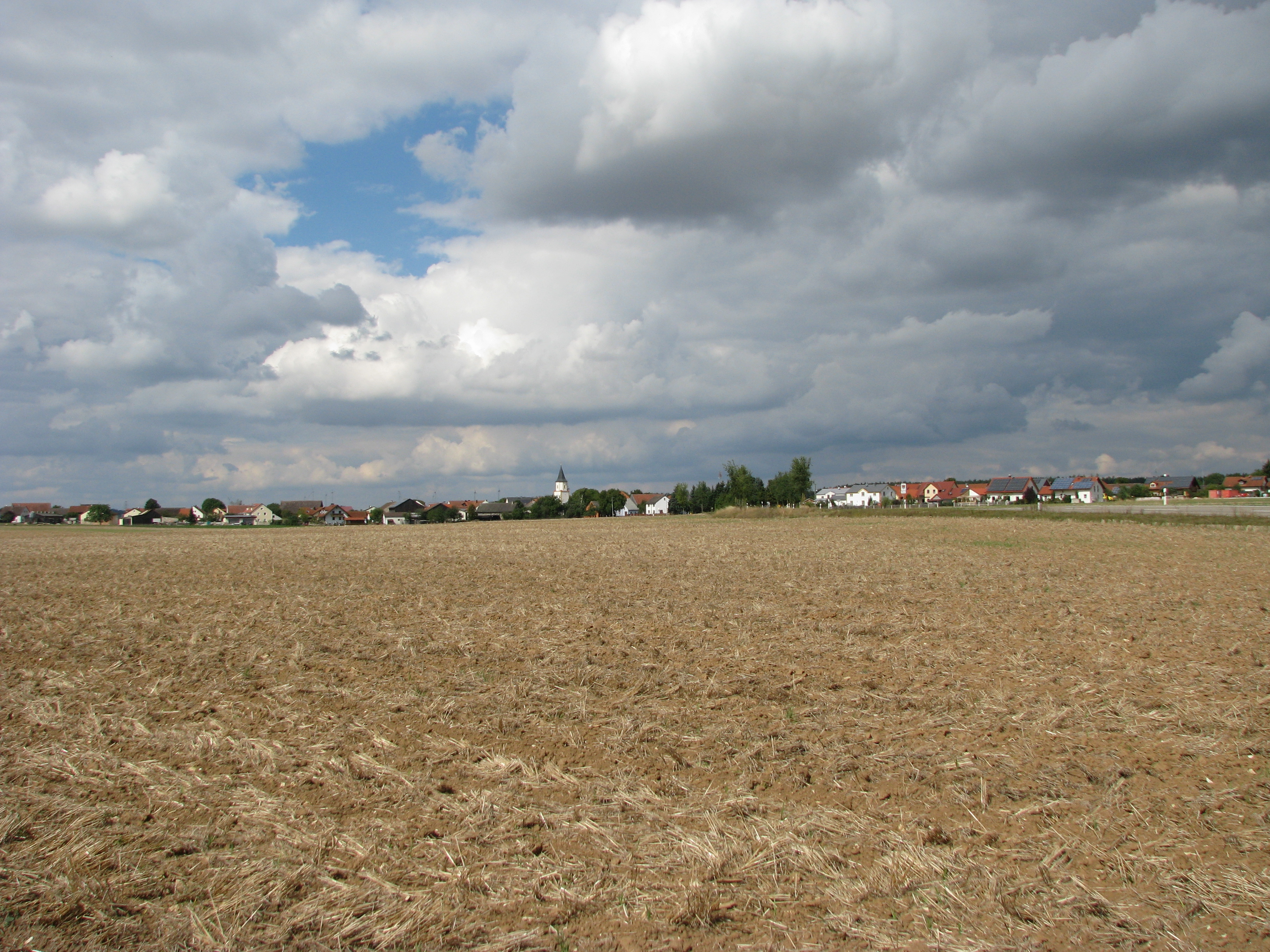 Reuth am Wald (Ortsteil von Raitenbuch im Landkreis Weißenburg-Gunzenhausen)